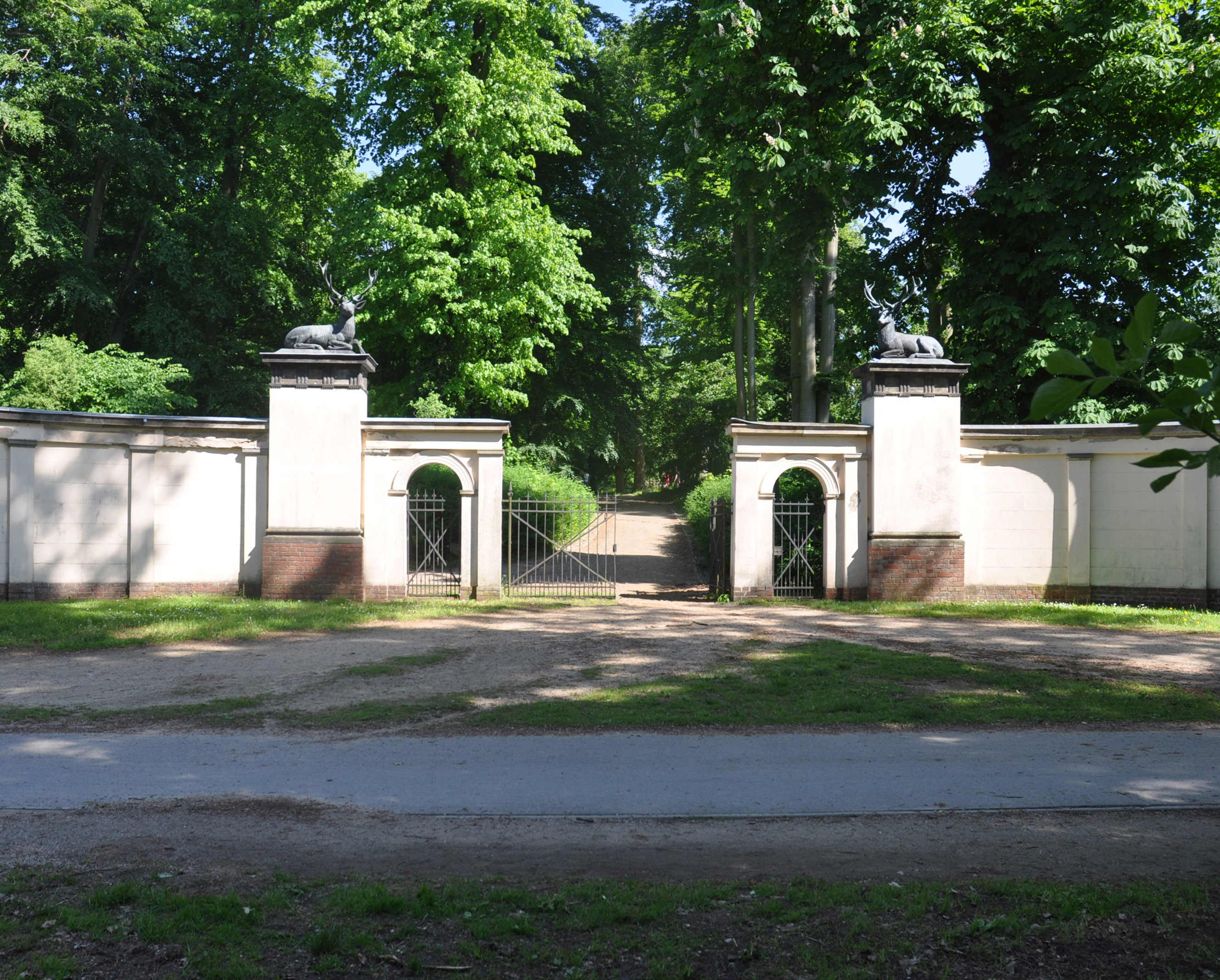 Mittelteil des Wassertors an der Uferchaussee von West